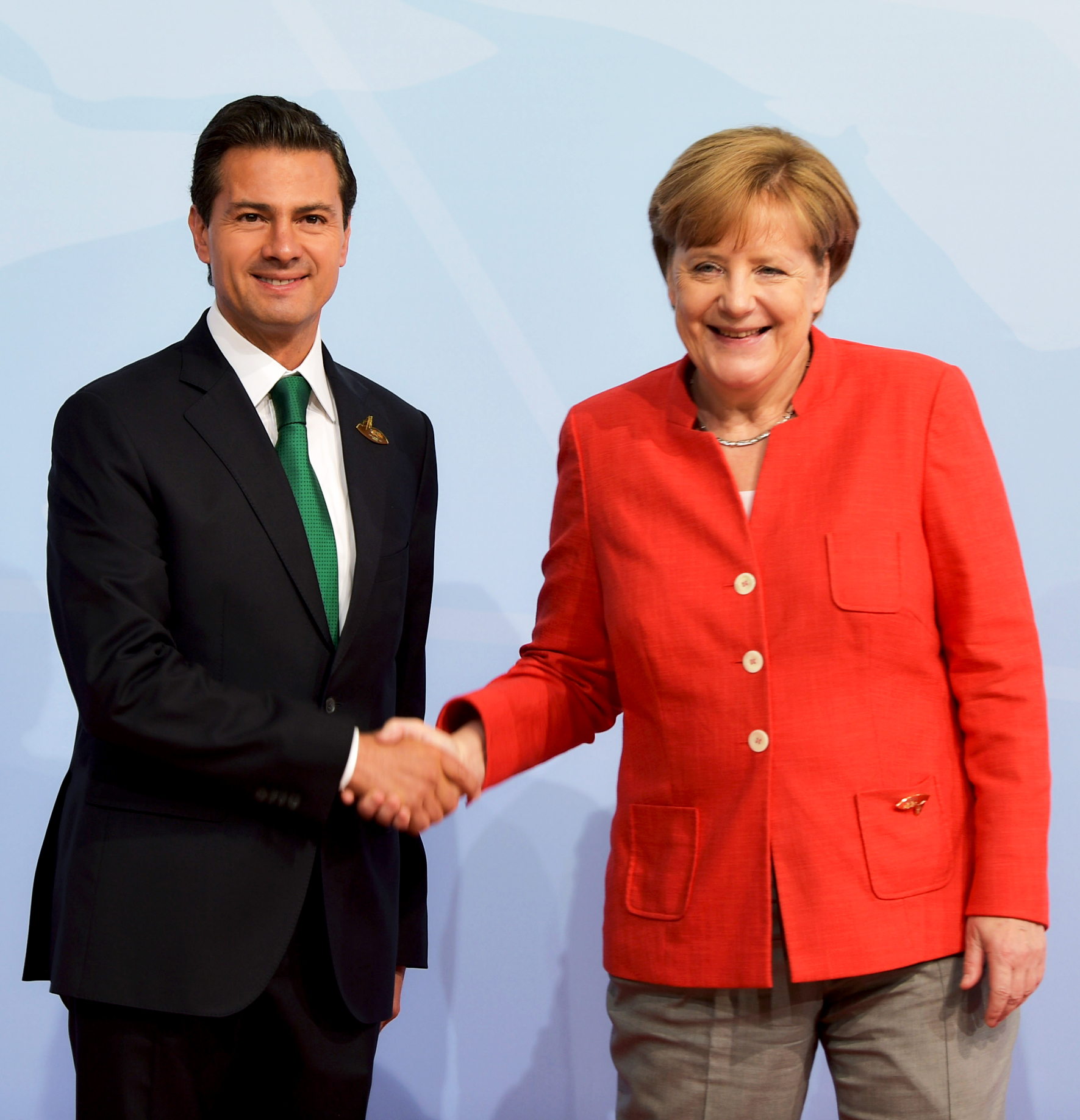 El Presidente Enrique Peña Nieto inició su participación en la Cumbre de Líderes del G20, que se realiza en Hamburgo, Alemania.